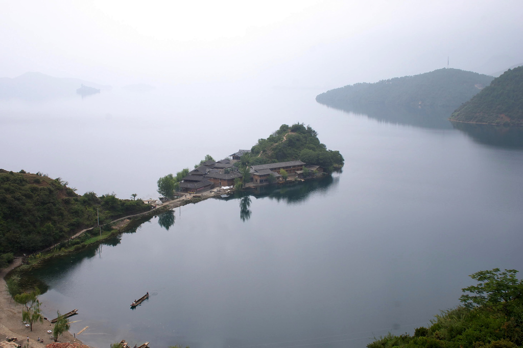 Lake Lugu, between Sichuan & Yunnan, China